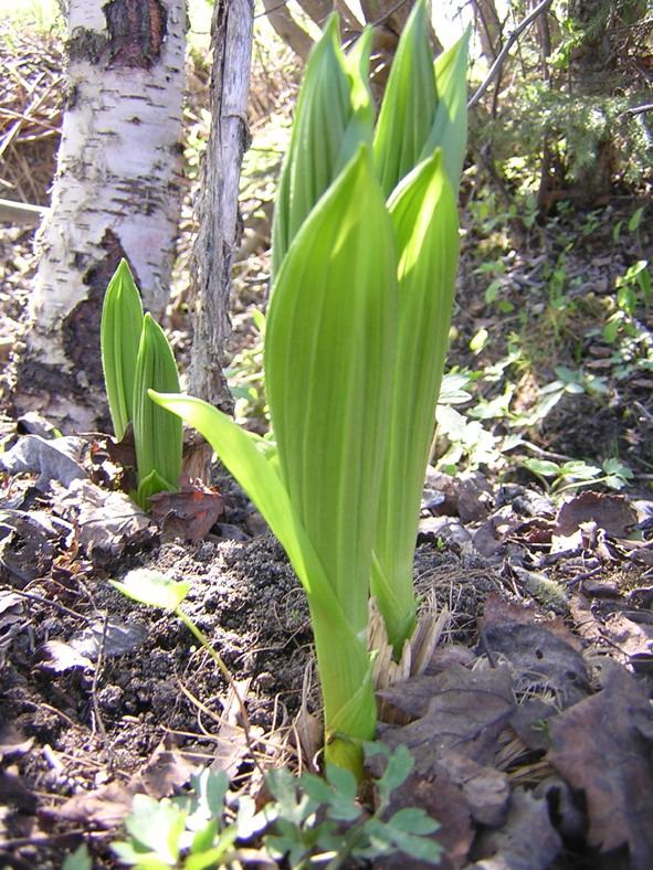 Чемерица белая весной. Россия, Республика Коми, Ухта - Veratrum Tourn, Komi, Ukhta (63°34′0″ N 53°42′0″ E)